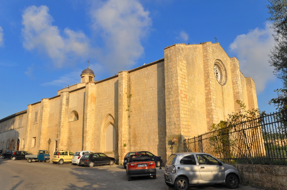 Tarquinia 2014